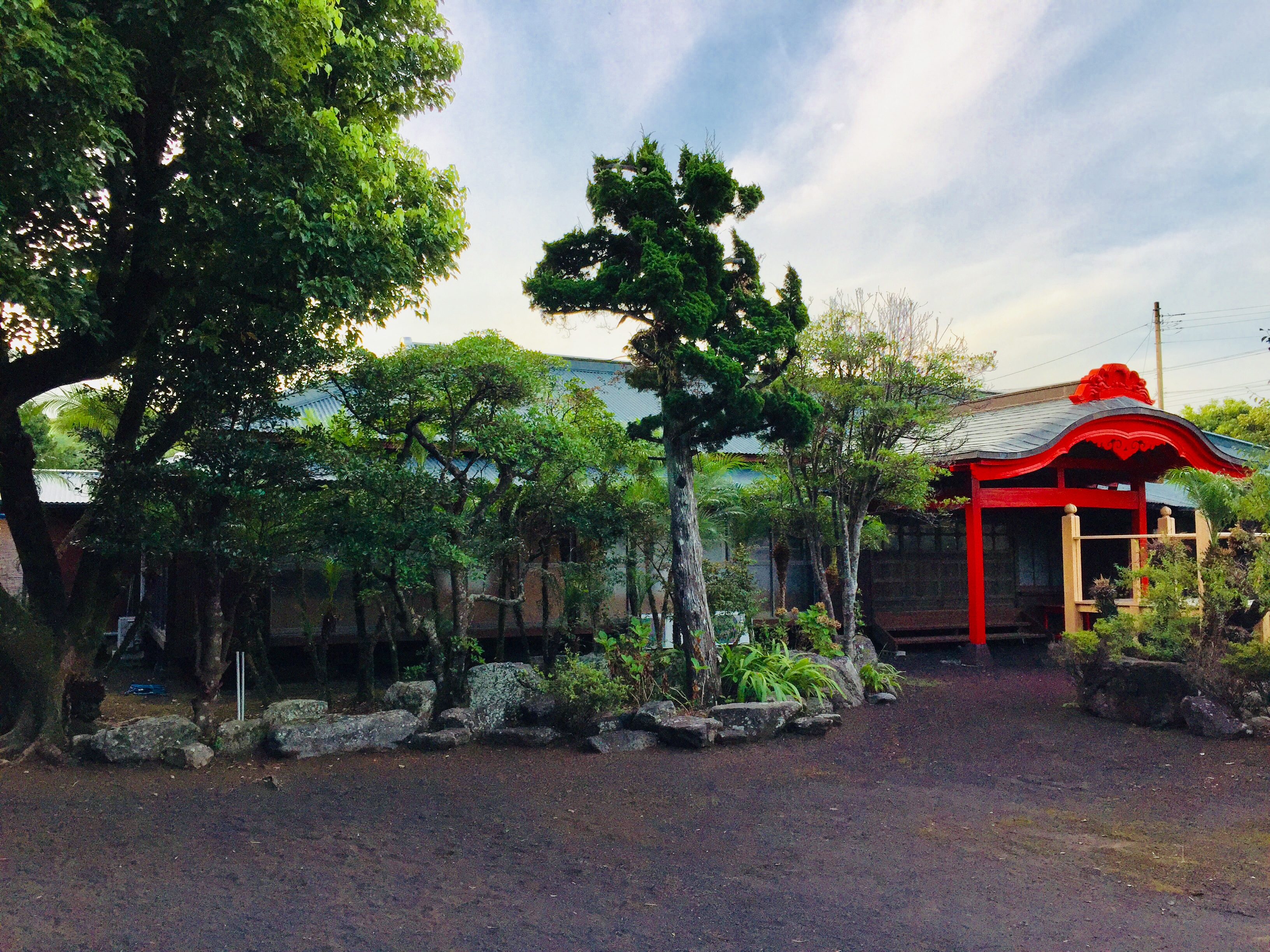 八丈島八丈町にある宗福寺の写真。